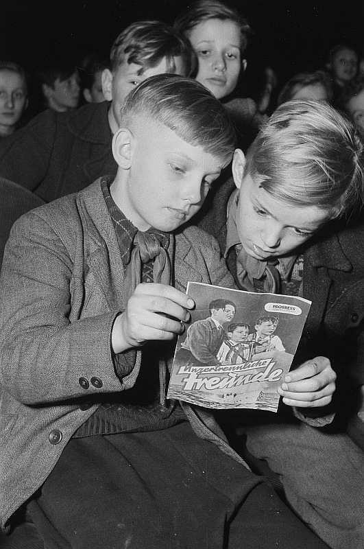 Original image description from the Deutsche Fotothek Zwei Pioniere des Bezirks Leipzig sehen sich das Progress-Programmheft bei der Premiere des Films "Unzertrennliche Freunde" im Kino Capitol an